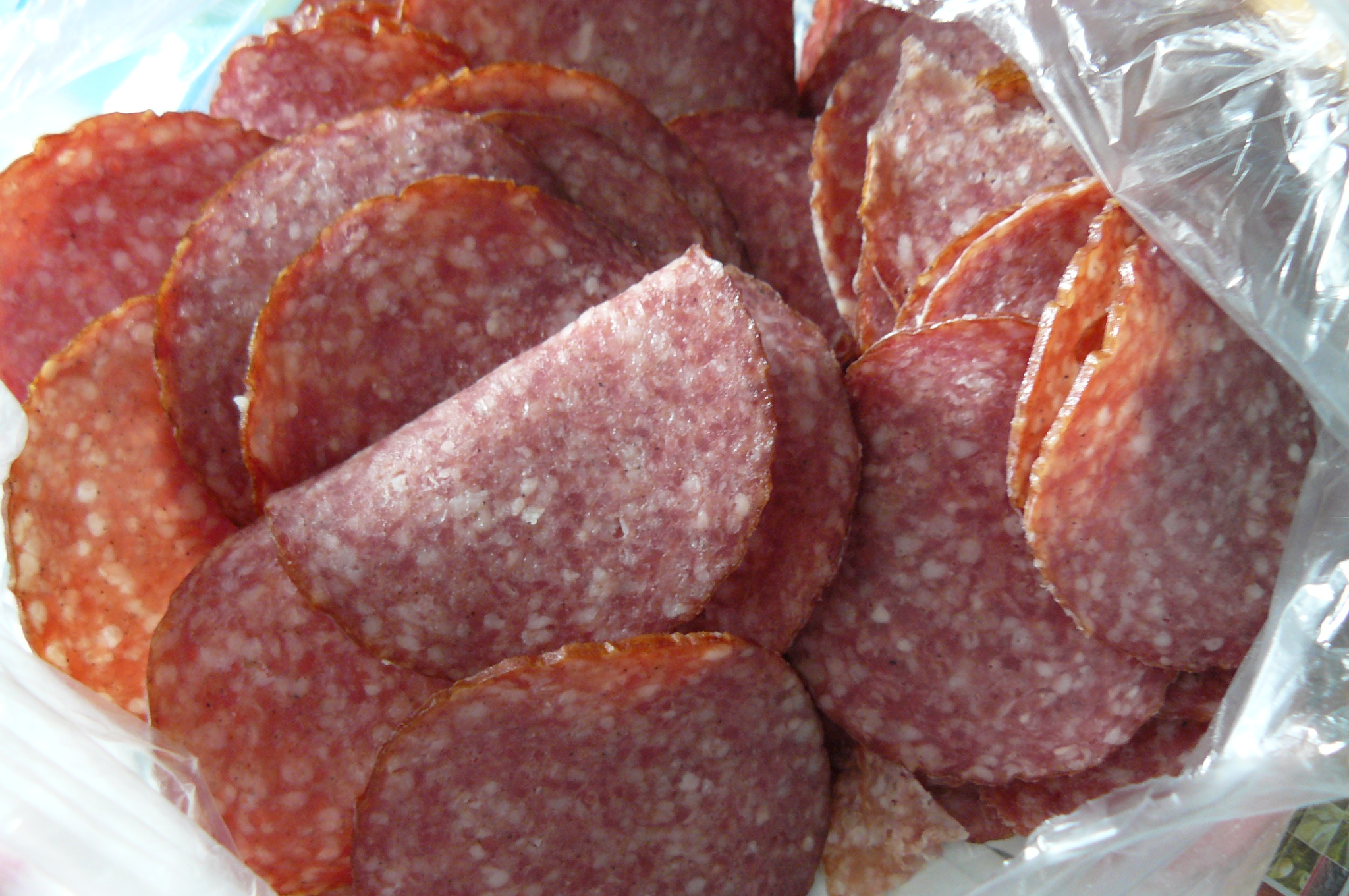 Popularne czeskie salami - Vysocina.